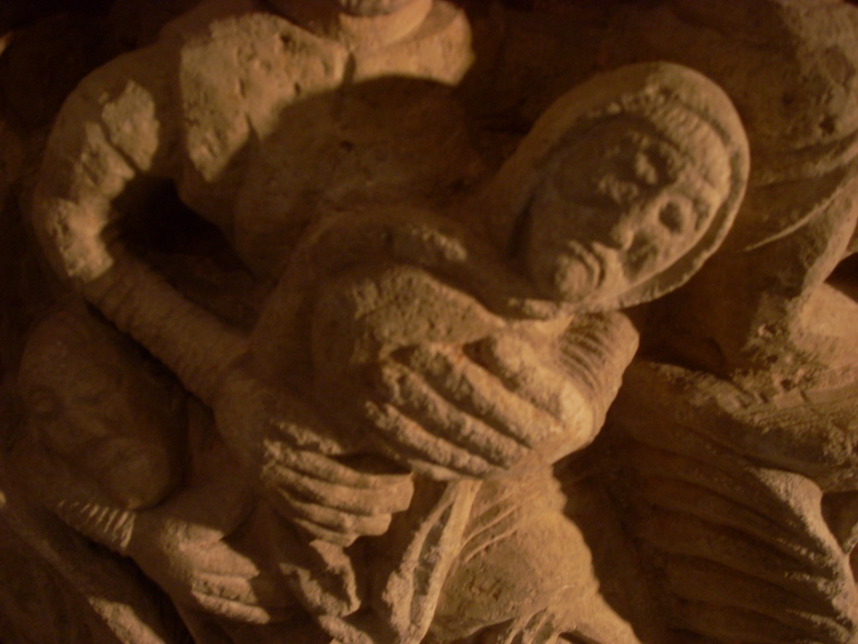 Detalle pila bautismal de Colmenares de Ojeda (Palencia)